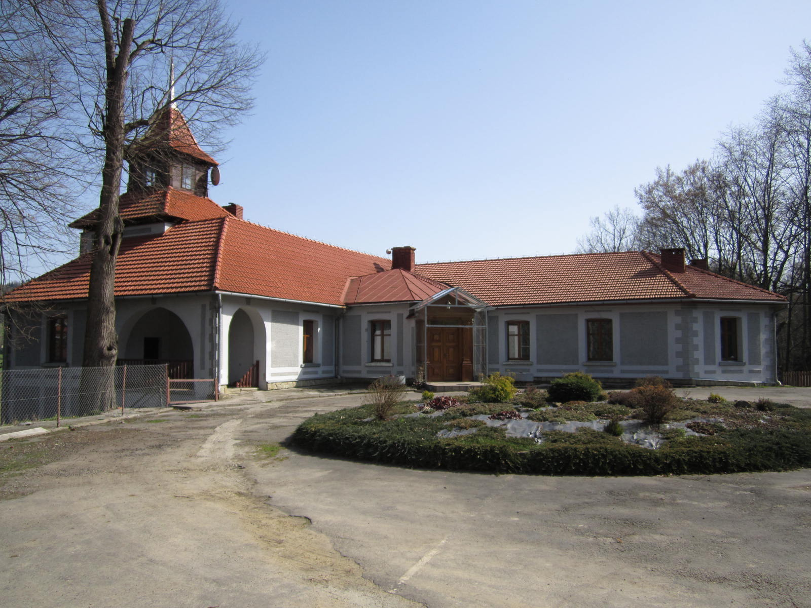 Zdjęcie przedstawia dwór Żuk-Skarszewskich od strony zachodniej.